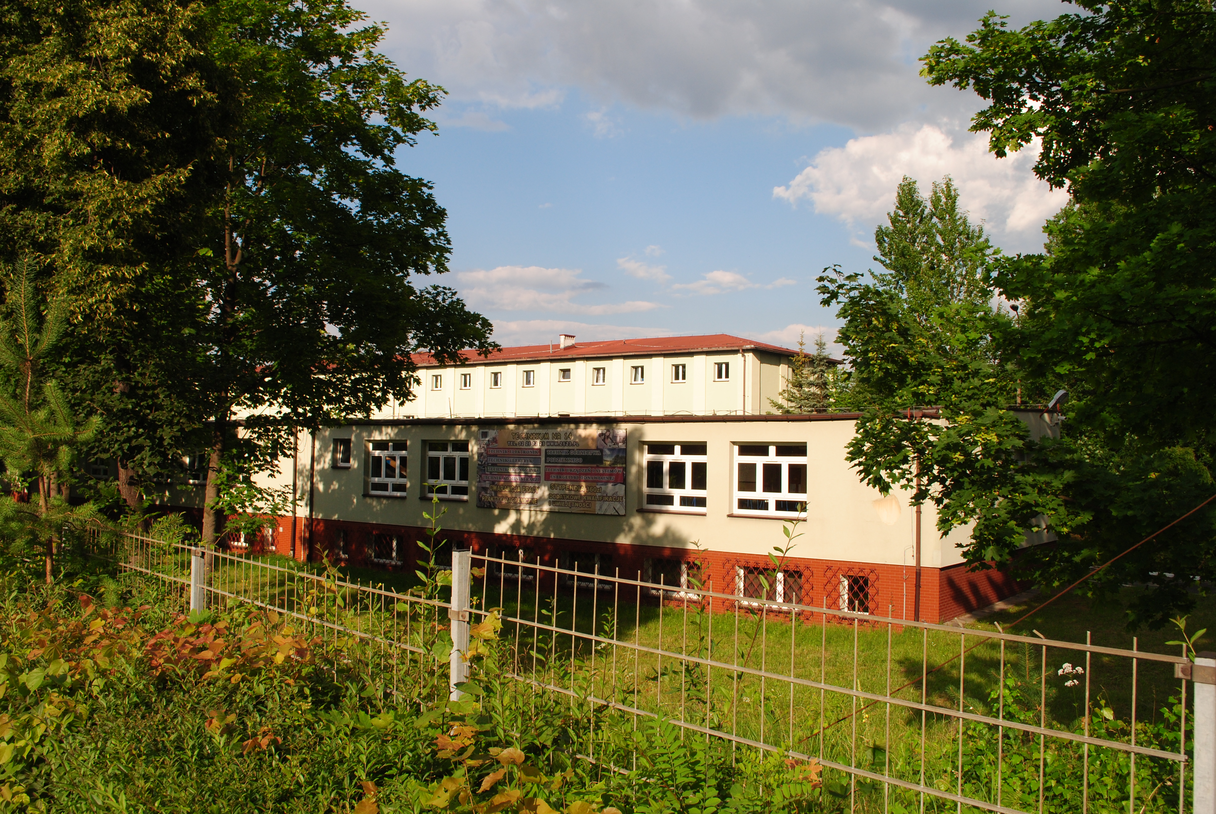 Katowice - Janów-Nikiszowiec. Zespół Szkół Zawodowych nr 3